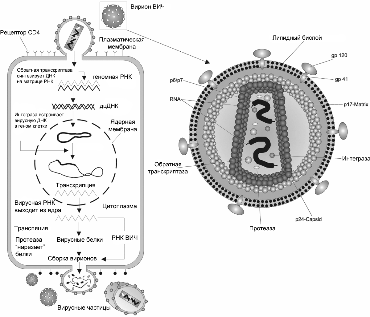 Жизненный цикл ВИЧ